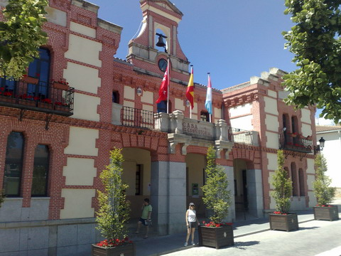 Ayuntamiento de Rascafria. Madrid (España)